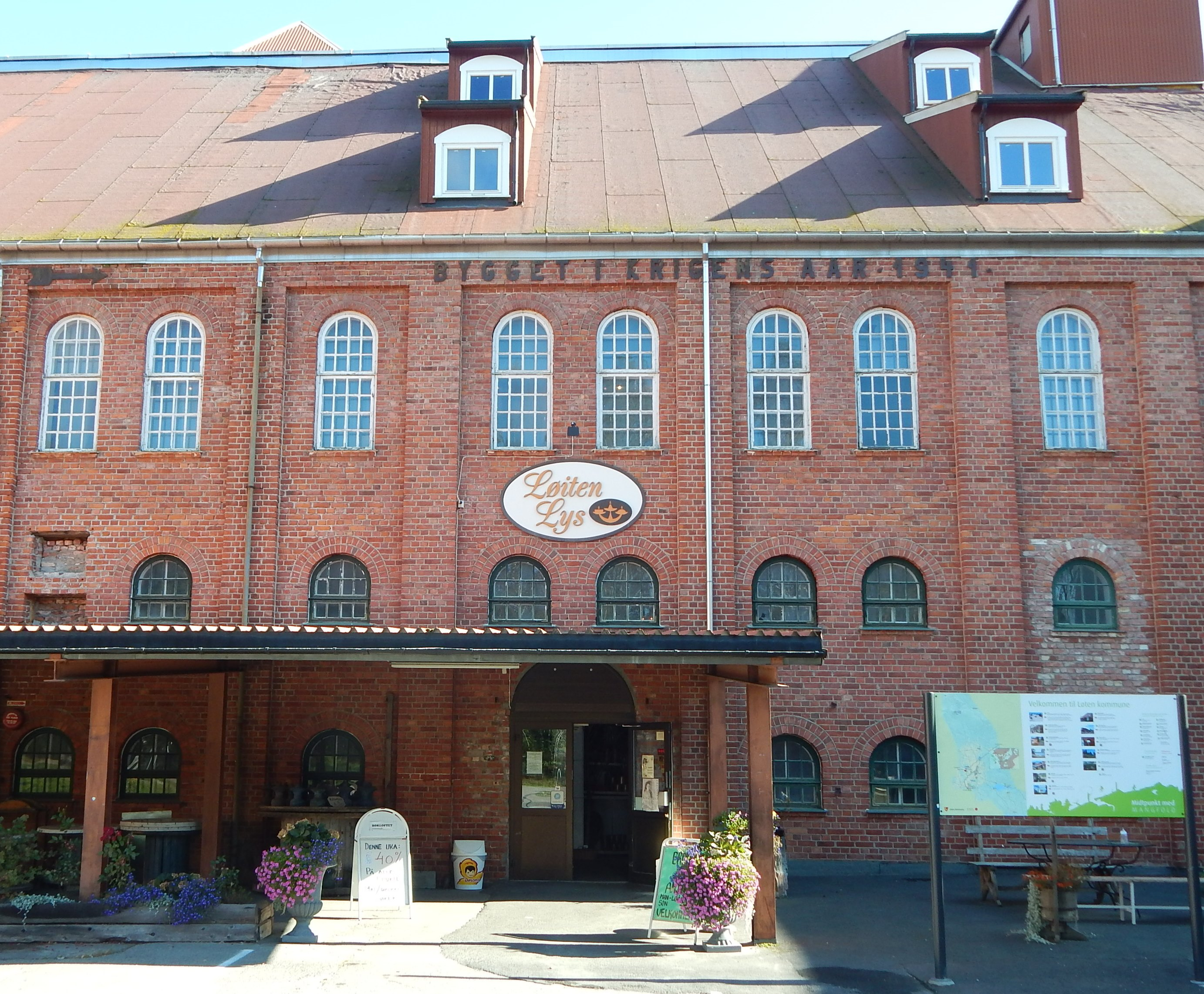 Løiten Lys har lokaler i det tidligere Løiten Brænderi.